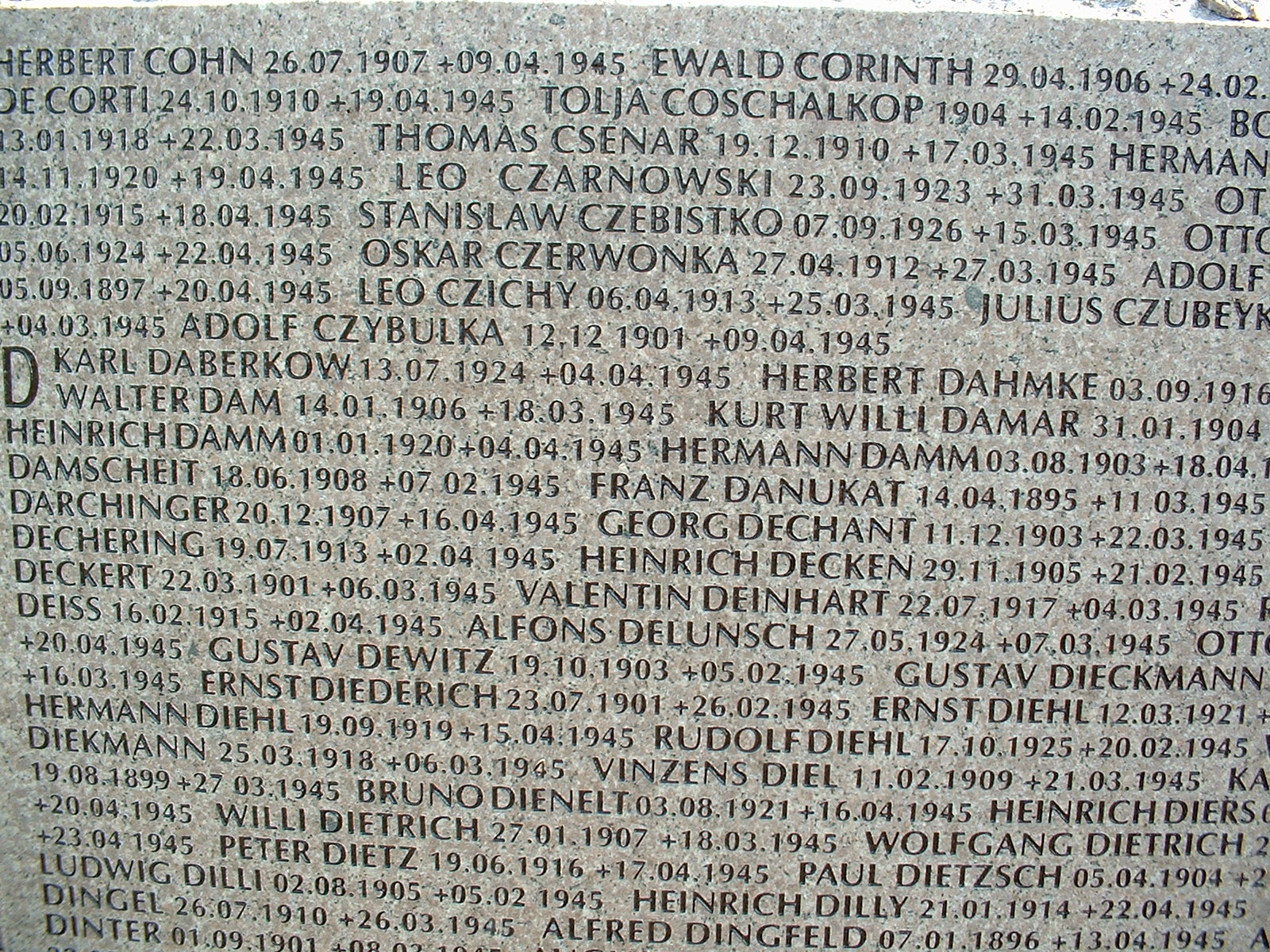 Балтийск. Текст на плите немецкого мемориального кладбища. 19/10/2003г.